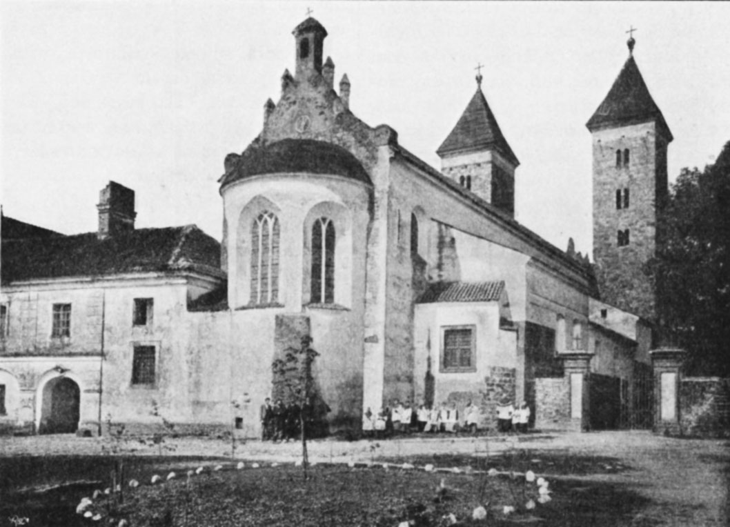 Kościół w Czerwińsku z absydą zaołtarzową. Zabytek wieku XII